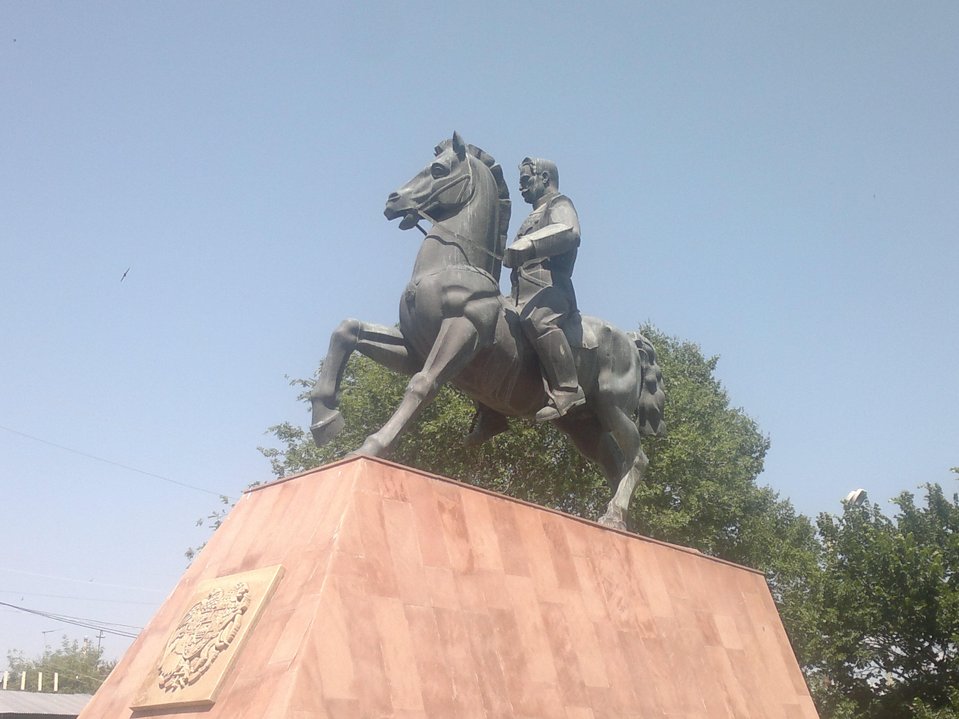 Անդրանիկի հուշարձանը Գյումրիում 1/4.876